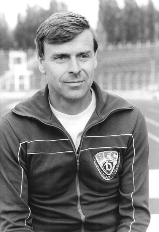 ADN-ZB-Oberst-17.7.87-ma-Berlin: Fußball-Oberligasaison 1987-88- Jürgen Bogs, geboren am 19.1.1947, Diplomsportlehrer, seit 1.7.1977 verantwortlicher Oberligatrainer des neunfachen DDR-Meisters BFC Dynamo. Siehe auch 36 N.